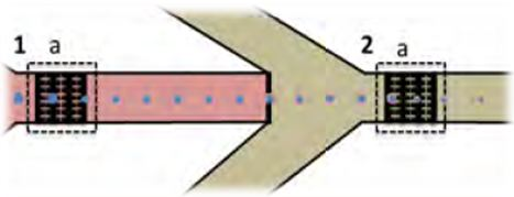 در این شکل می توان در قسمت a محل قراردادن الکترودها را مشاهده کرد.